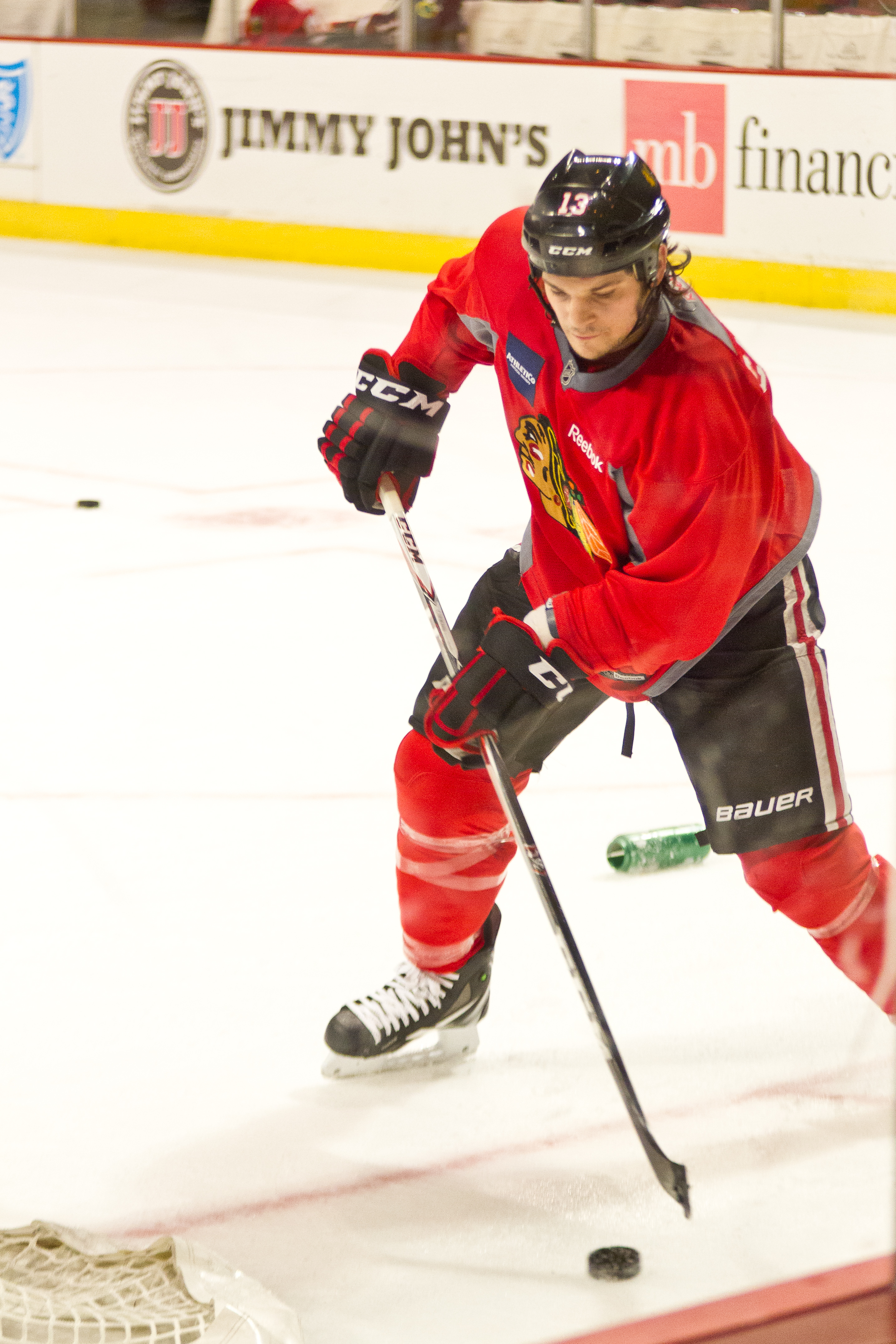 Daniel Carcillo